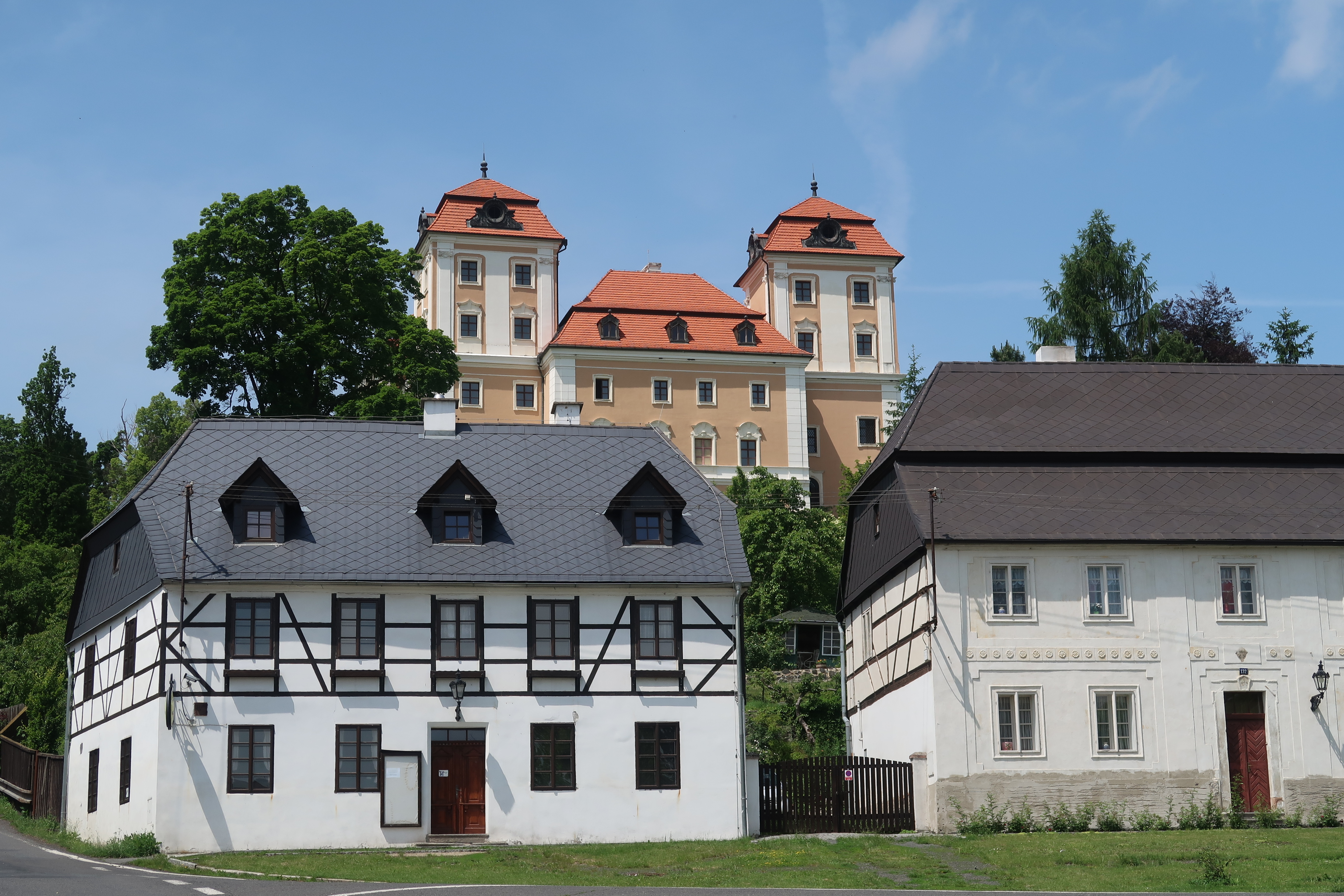 Náměstí a zámek